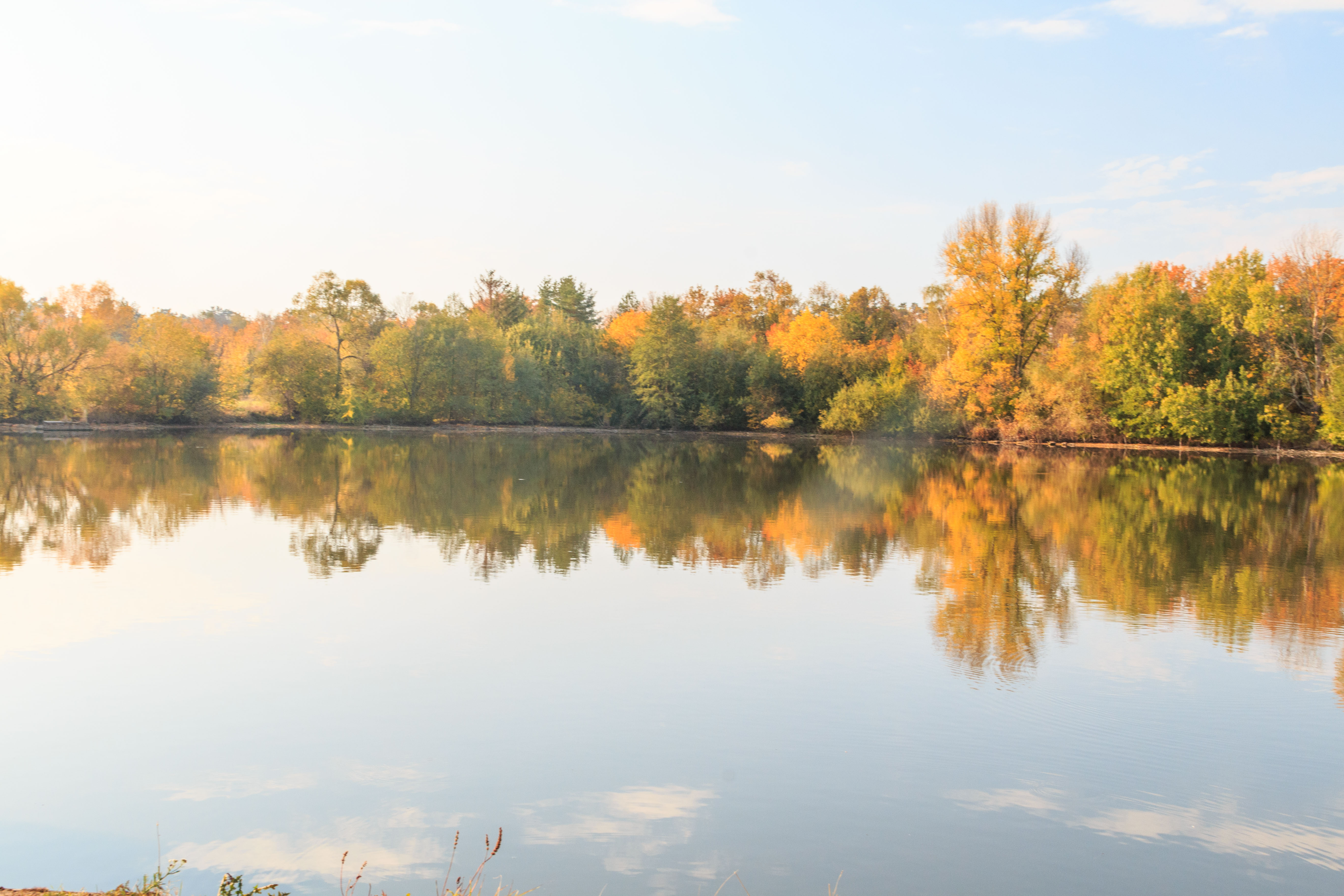 Rybník Mazánek u Kunčí Project: Vodstvo. Ticket: 1618.